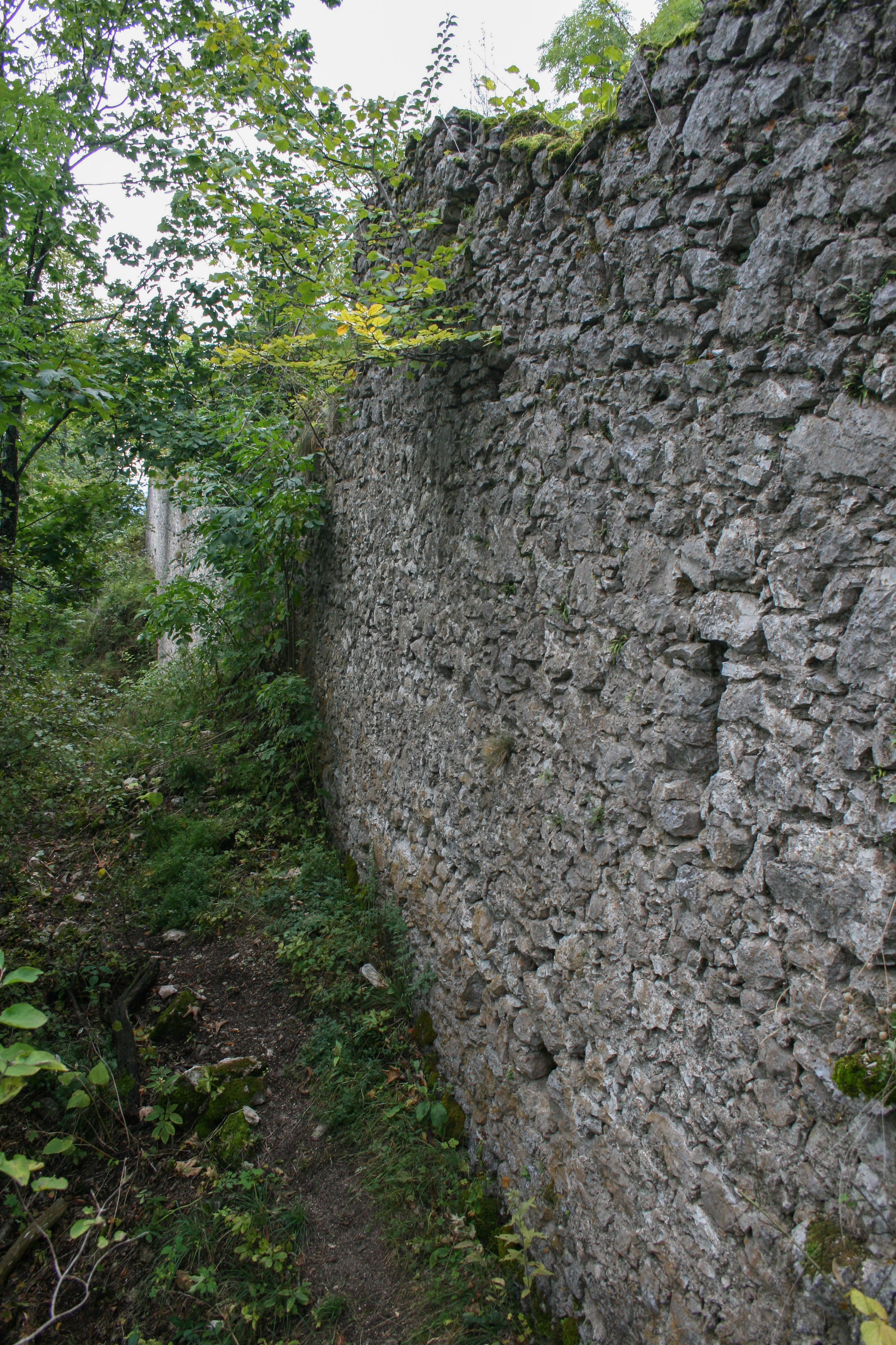 Časť opevnenia hradu.